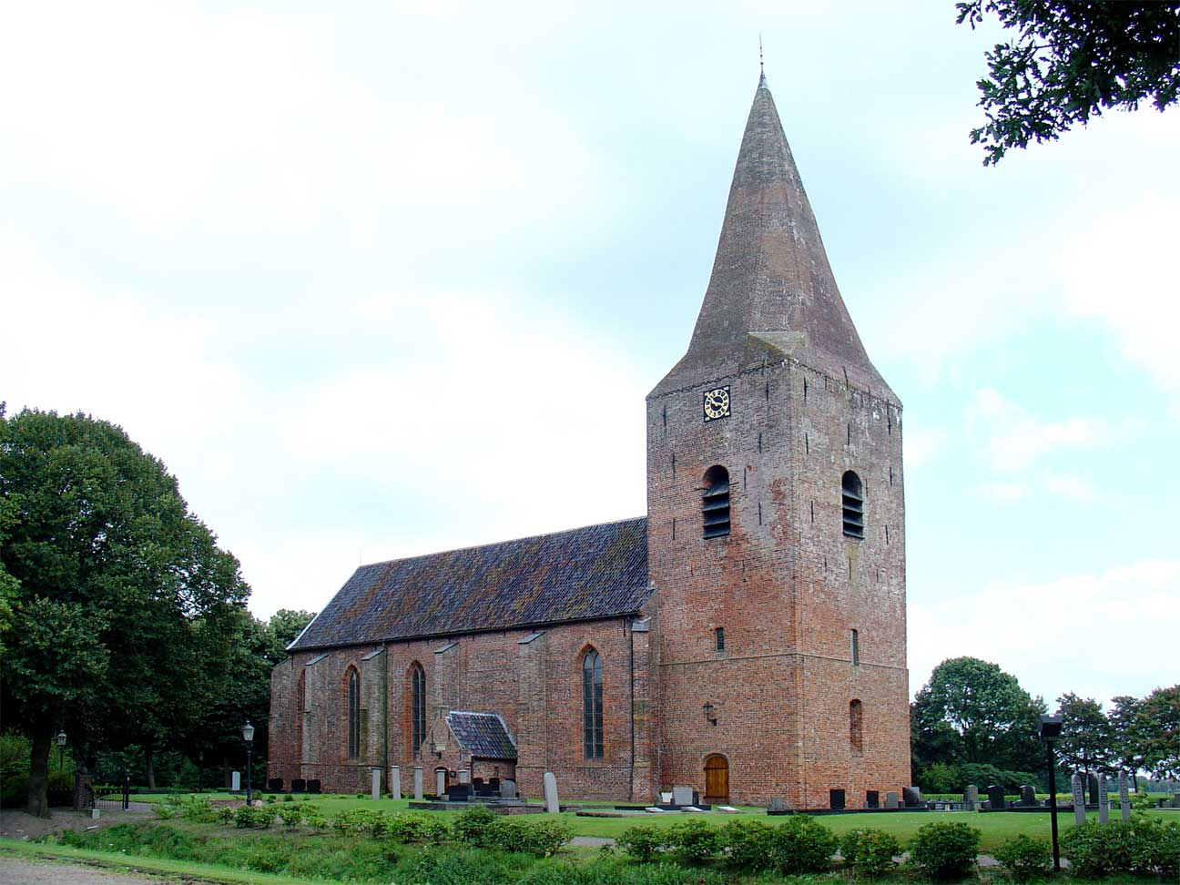 Nicolaaskerk van Onstwedde (noordzijde)